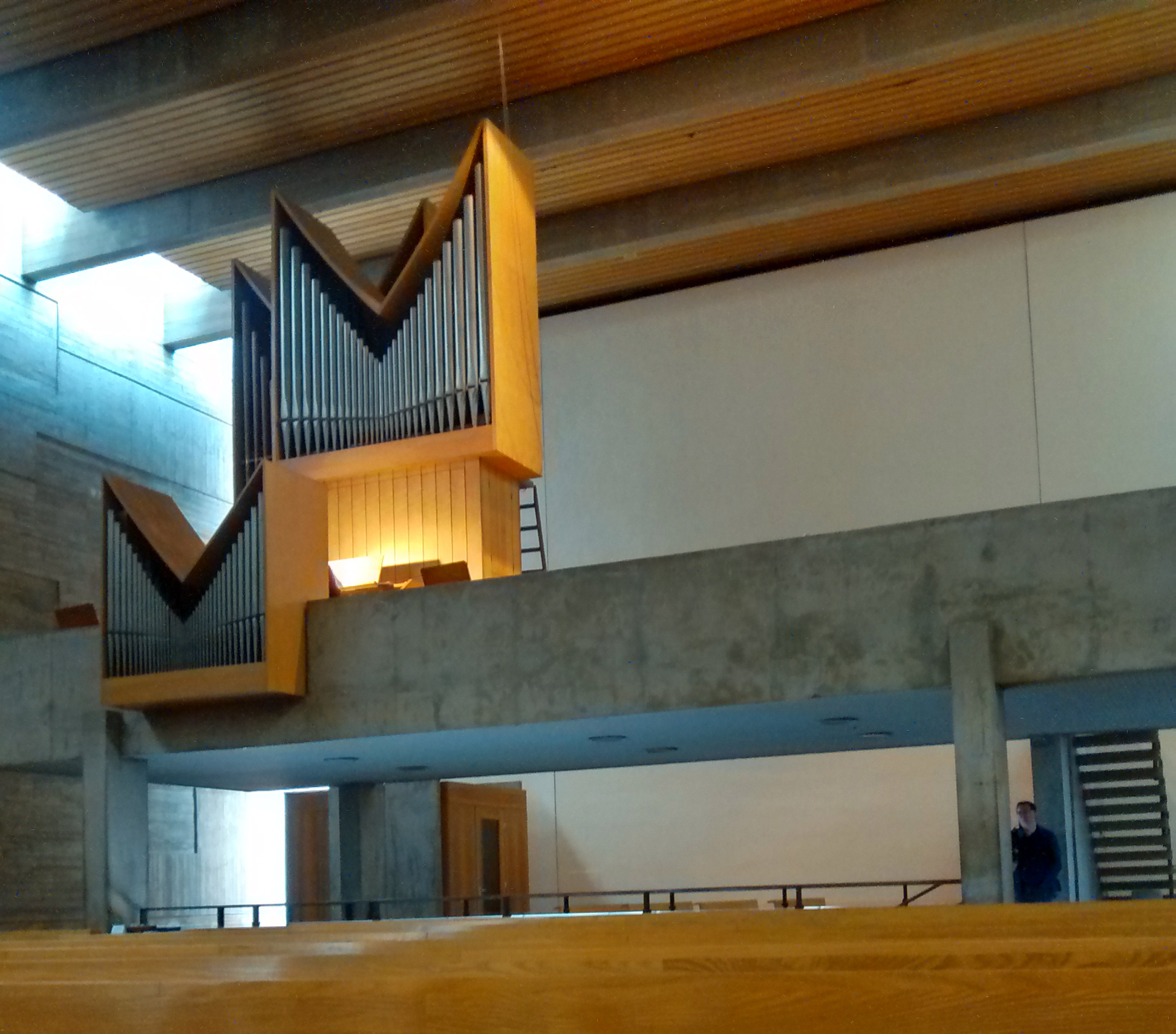 Gedenkkirche Maria Regina Martyrum, 1959–1963, Hans Schädel & Friedrich Ebert, Heckerdamm, Charlottenburg-Nord, Orgel in der Oberkirche, Opus 1258 der Orgelbaufirma Johannes Klais, Bonn, 1963